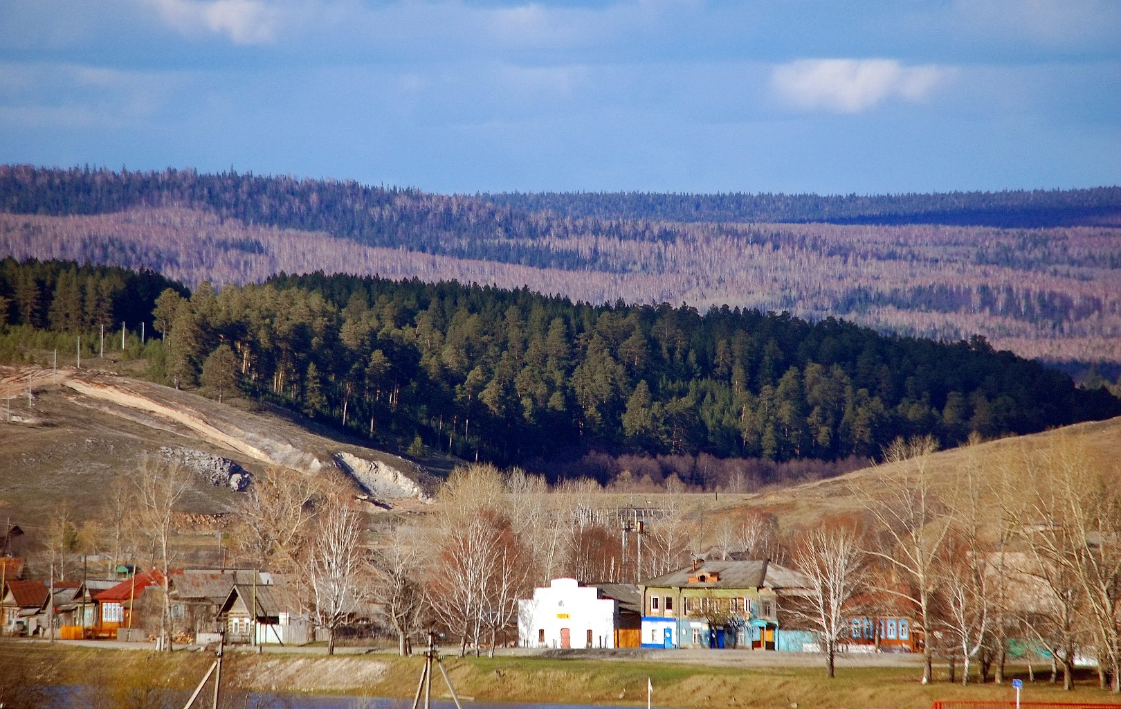 Село Шемаха́ Нязепетровского района Челябинской области